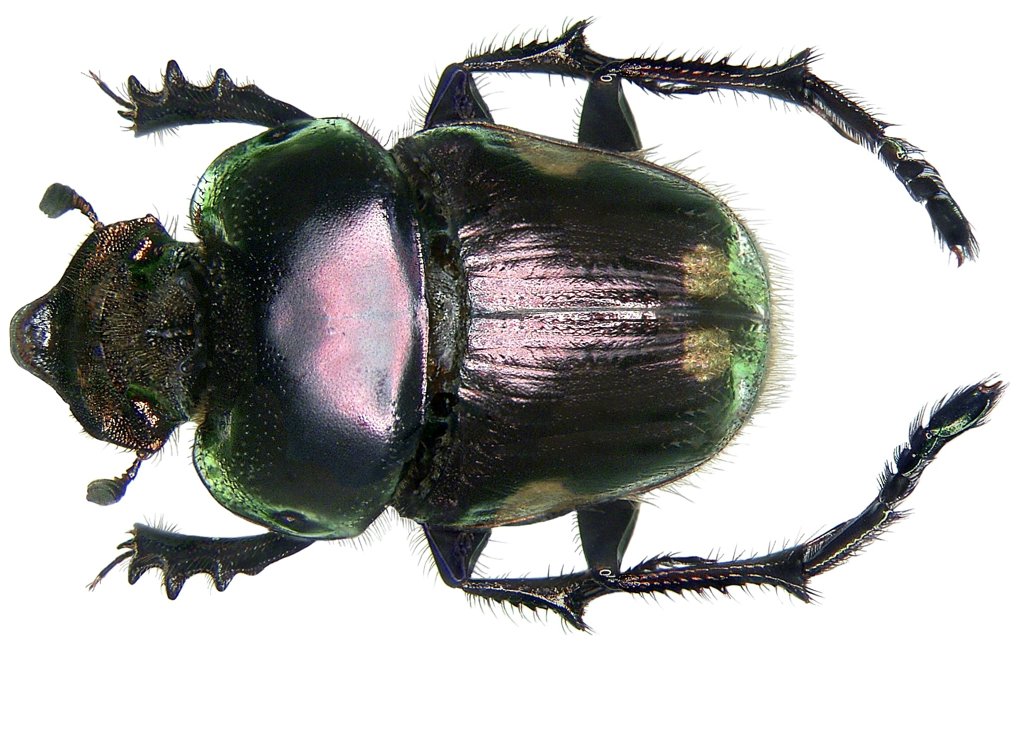 Familie: Scarabaeidae Grösse: 12 mm Verbreitung: Äthiopien, Somalia, Kenia, Tanzania Fundort: Kenia, Tsavo National Park leg. det. U.Schmidt, 1991 Foto: U.Schmidt, 2008